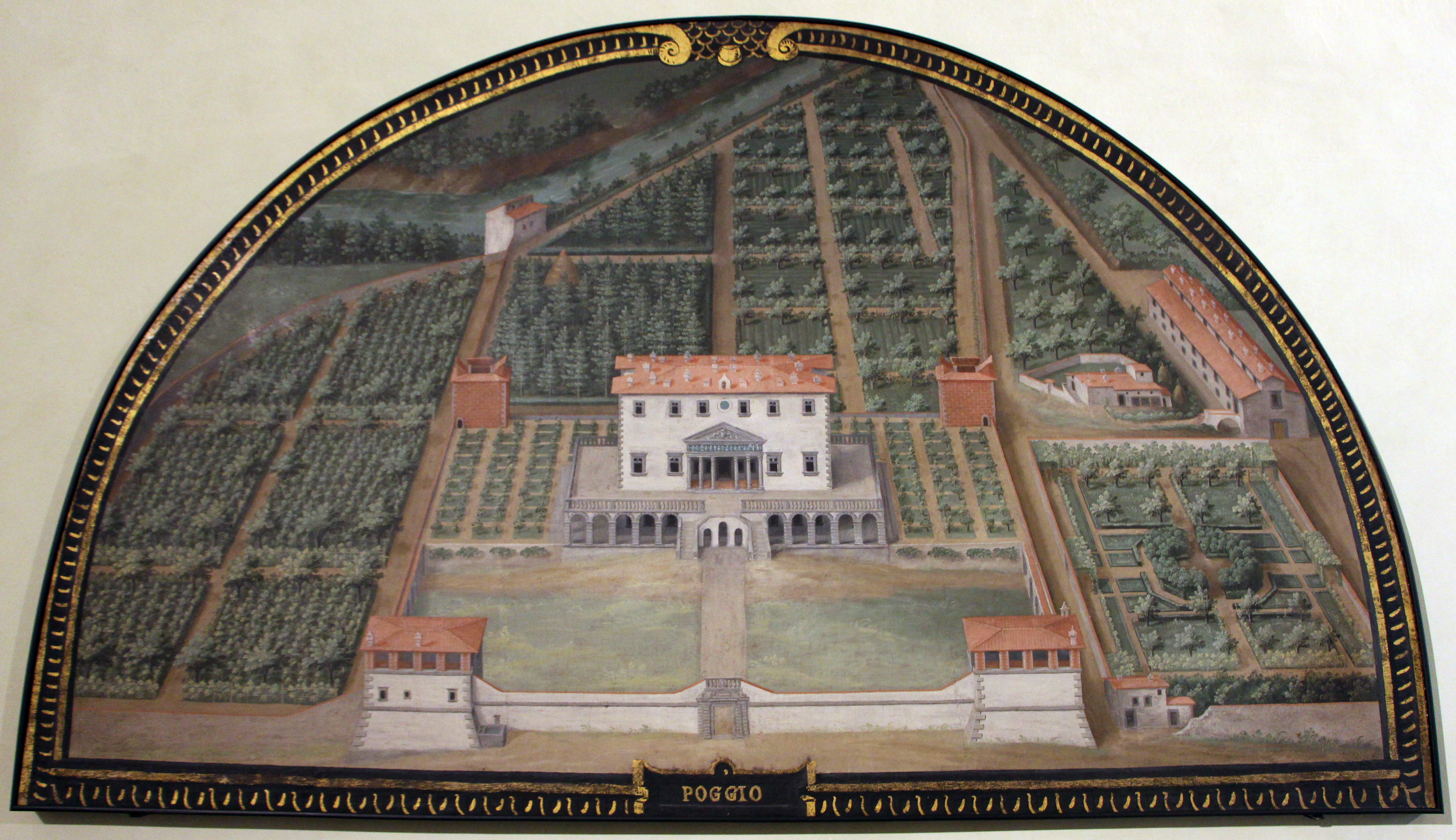 Villa medicea della Petraia - MIBAC The making of this document was supported by Wikimedia CH. (Submit your project!) For all the files concerned, please see the category Supported by Wikimedia CH. This is a photo of a monument which is part of cultural heritage of Italy.